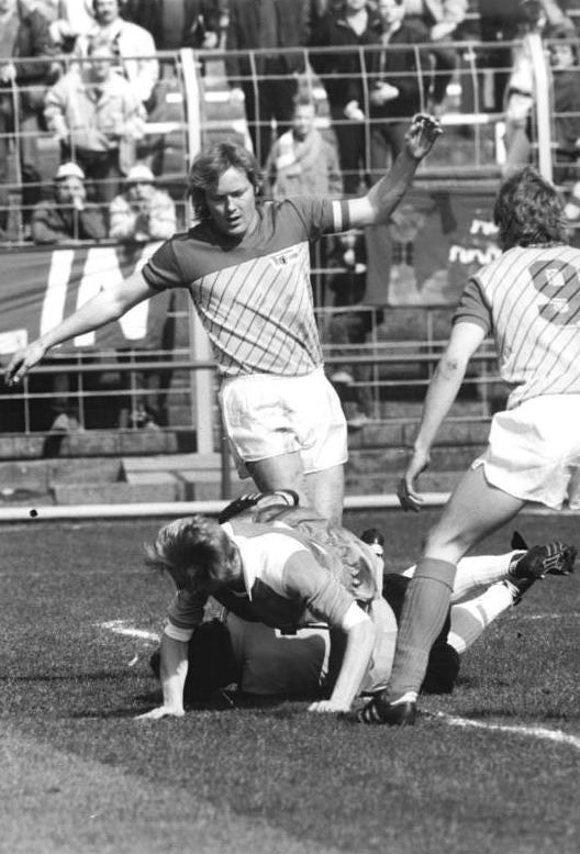 ADN-ZB-Oberst-11.4.87-mb-Berlin: Fußball-Oberliga- Der 1. FC Union Berlin besiegte den FC Karl-Marx-Stadt mit 4:2 (2:1). Hier scheitert der dreifache Torschütze Sträßer am Karl-Marx-Städter Torhüter Hiemann. R.: Hirsch (1. FC Union Berlin).